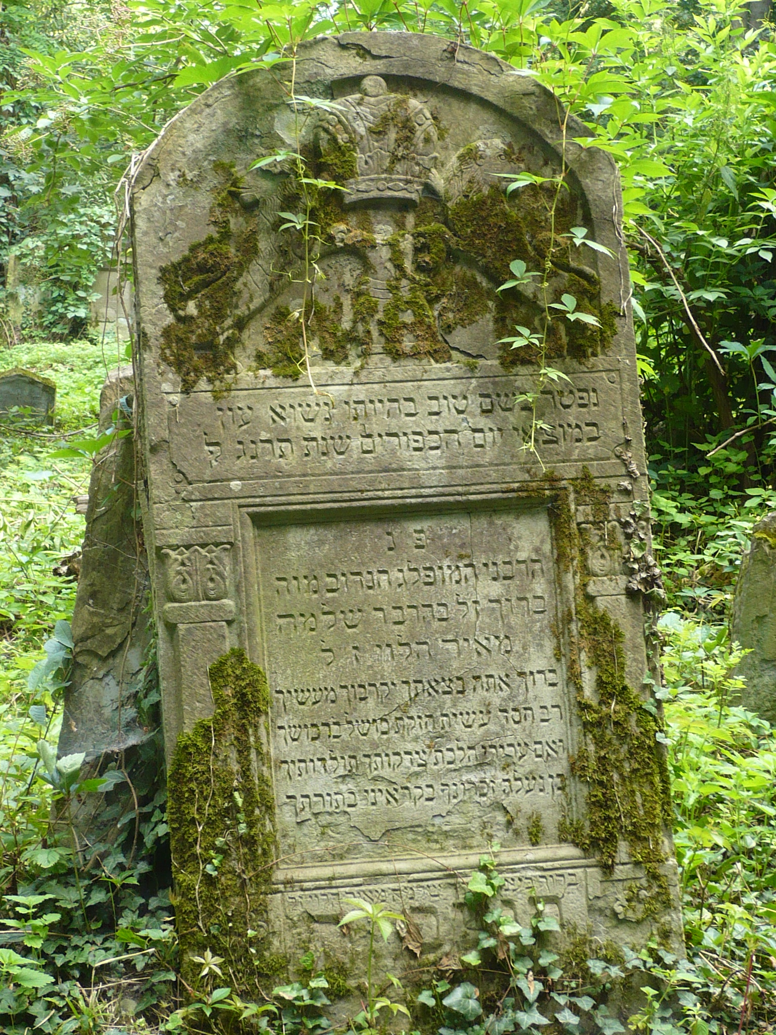 Przemyśl, nowy cmentarz żydowski